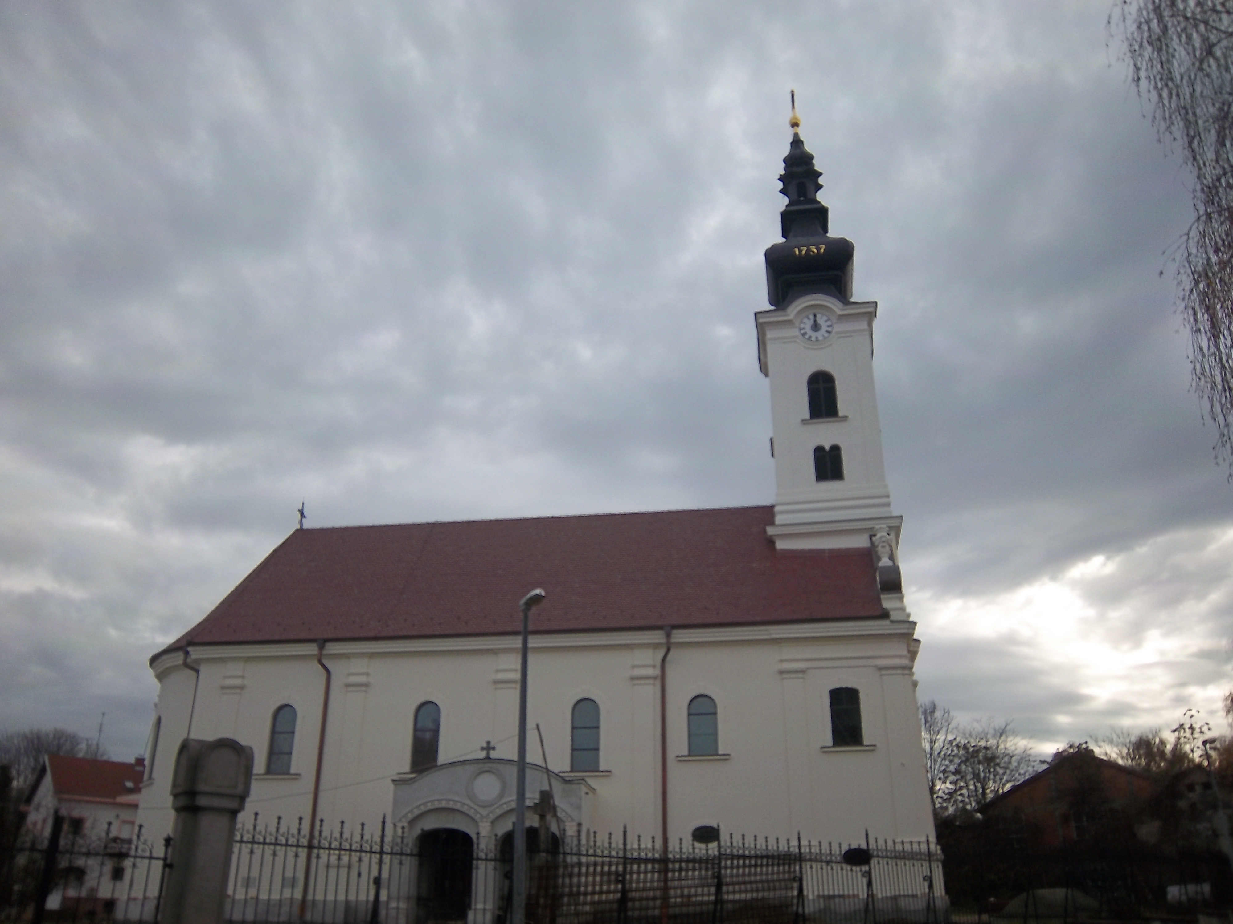 Pravoslavna crkva u Vukovaru.